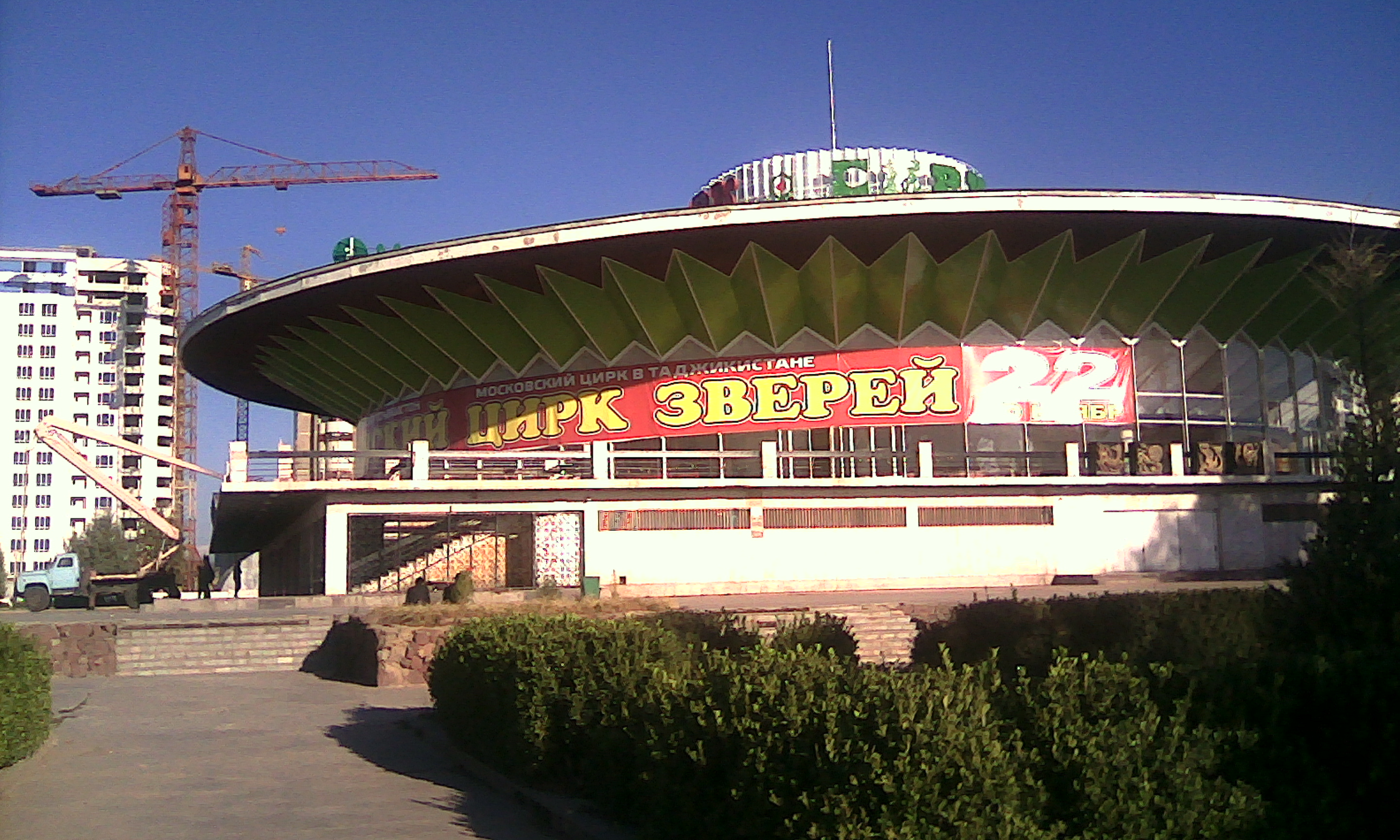 Здание Таджикского цирка в городе Душанбе, Таджикистан. Здание построено в 1970 году. Тоҷикӣ: Бинои Сирки Тоҷикистон дар Душанбе, Бинои сирк соли 1970 бунёд шудааст. Акс, соли 2015